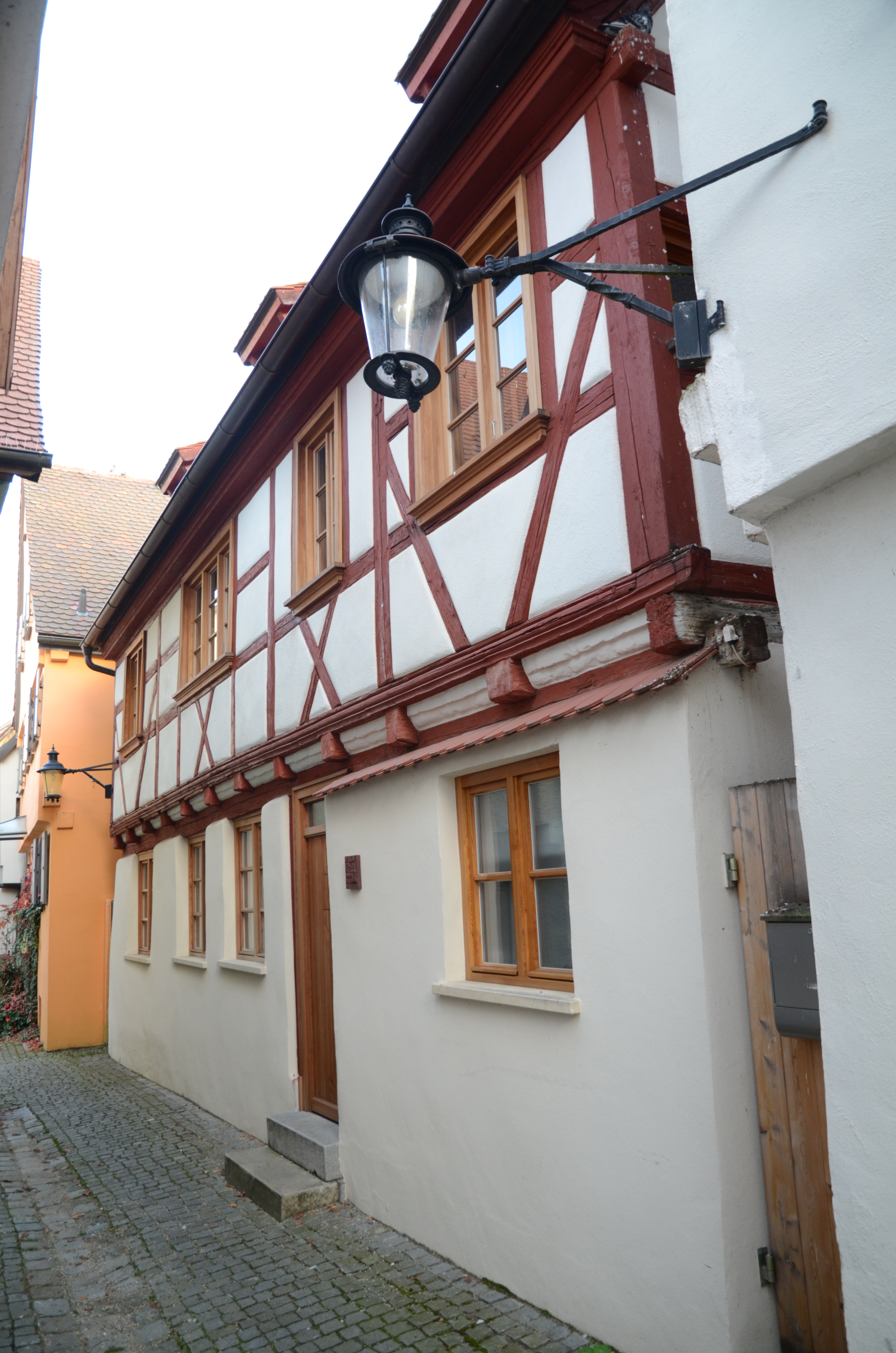 Günzburg, Münzgasse 11